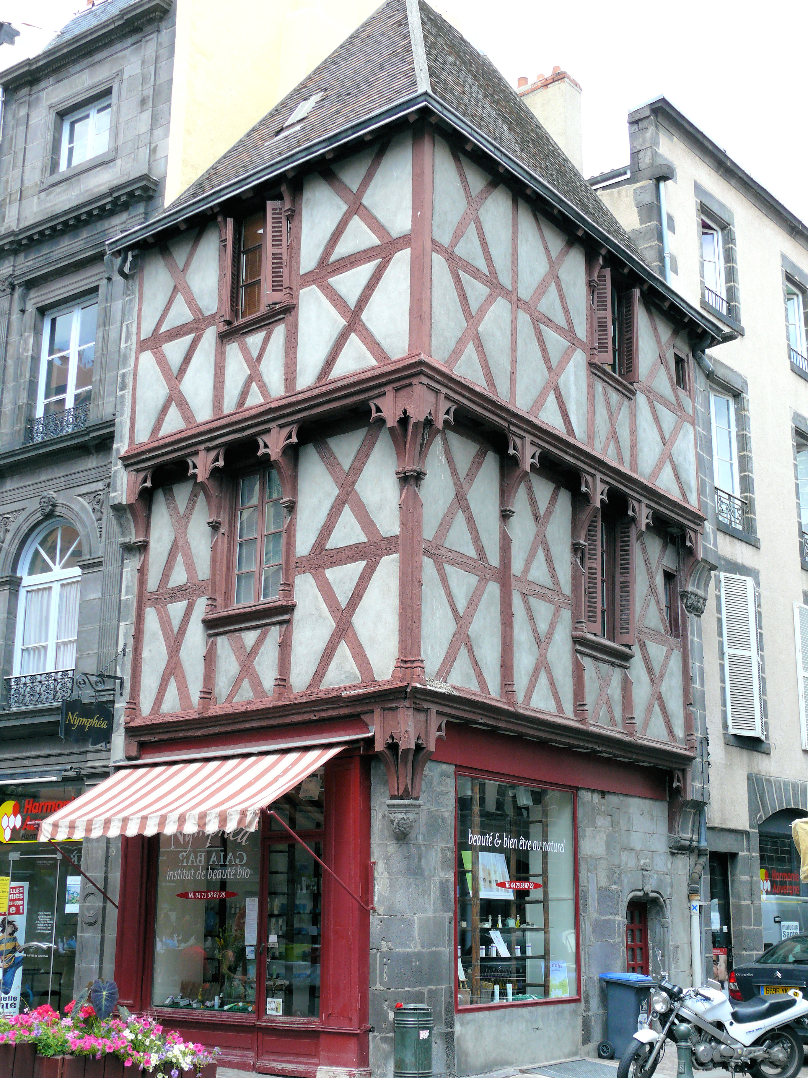 Riom - Maison en pans de bois à deux encorbellements à l'angle de la rue de l'Hôtel de Ville et de la rue Soubrany. Le colombage est en croix de Saint André. La petite porte sur droite est couverte d'un arc décoré d'un tore. Cette maison date du XVe siècle.